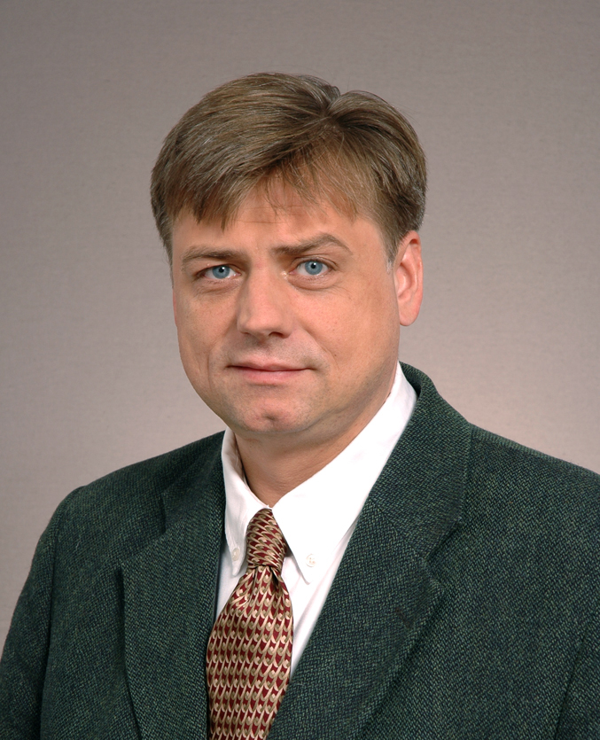 Senator Kosma Złotowski